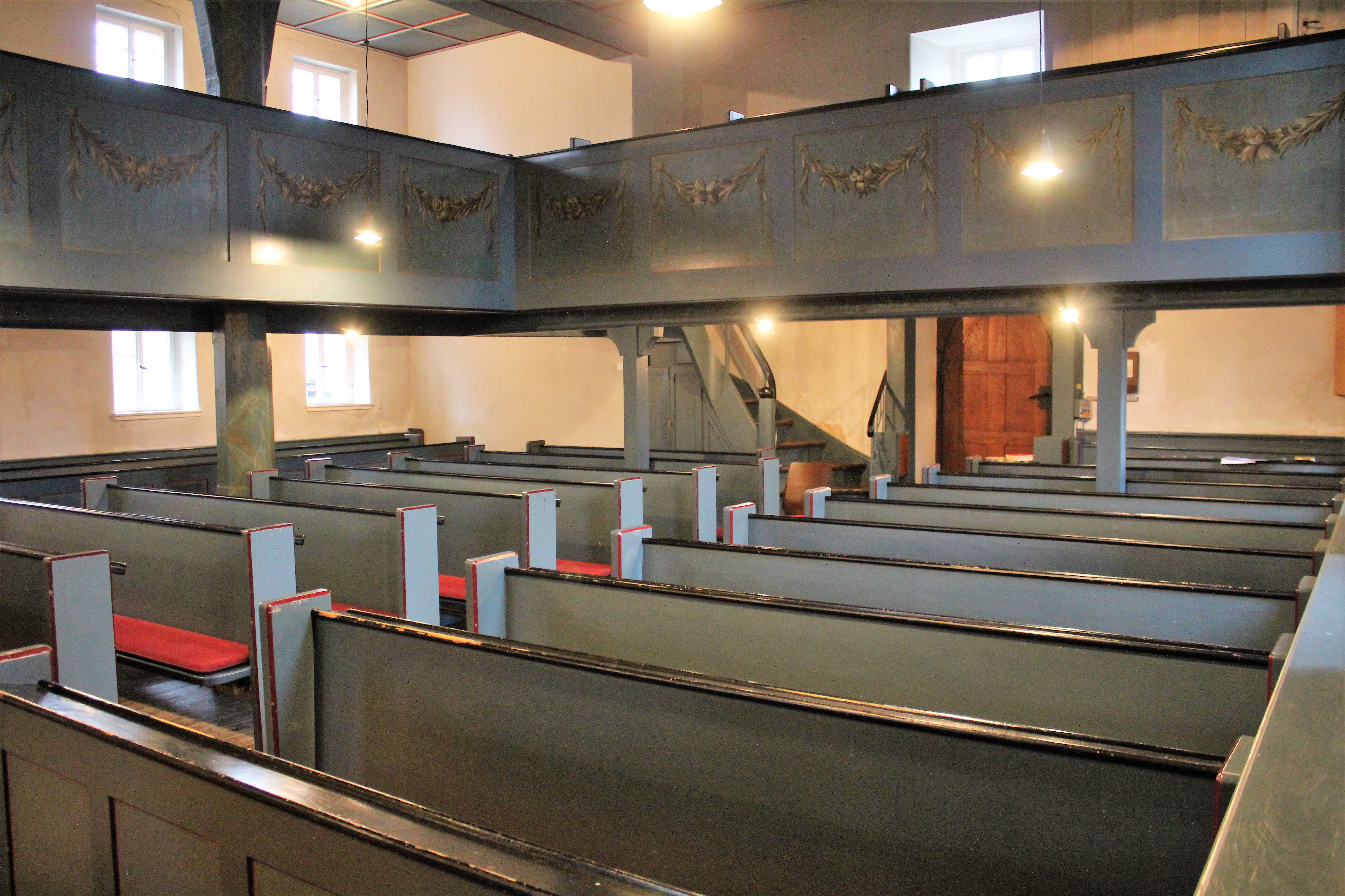 Evangelische Kirche Flensungen, Gemeinde Mücke, Vogelsbergkreis, Hessen, Deutschland